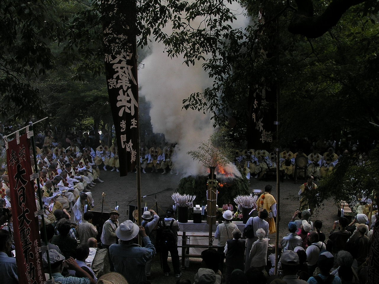 伽耶院採燈大護摩供